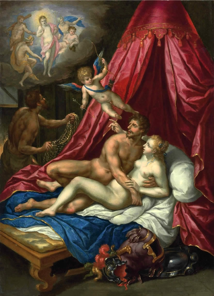 47 × 34.6 cm